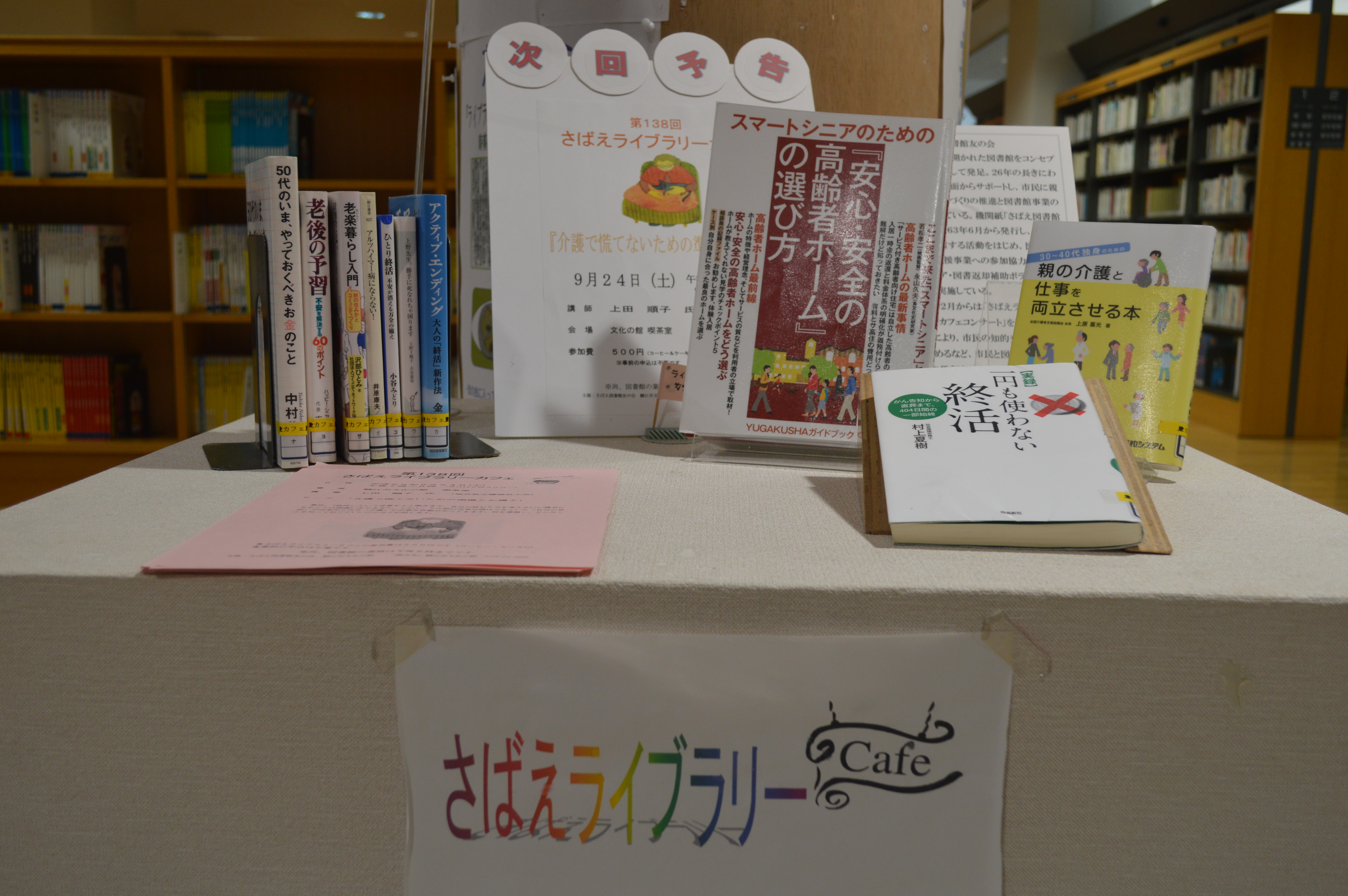 鯖江市図書館1階。さばえライブラリーカフェの紹介コーナー。